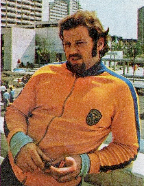 CAMPIONI dello SPORT 1973/74-Figurina n.64- BRUCH - SVEZIA -ATL.LEGGERA-Rec